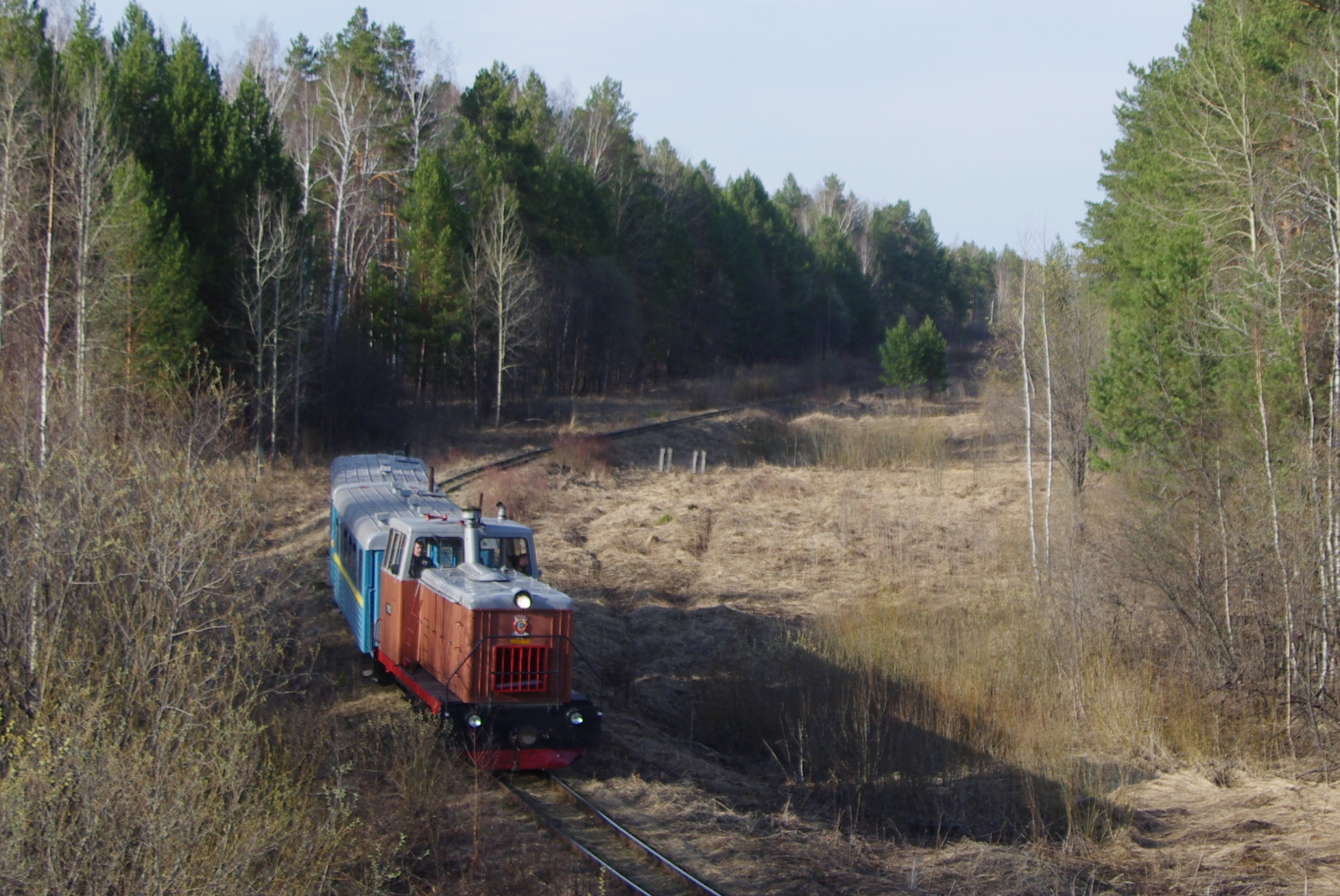 Экскурсионный поезд Алапаевск - Санкино. 2-3 мая 2014 г. Организован проектом "Поезд Напрокат".